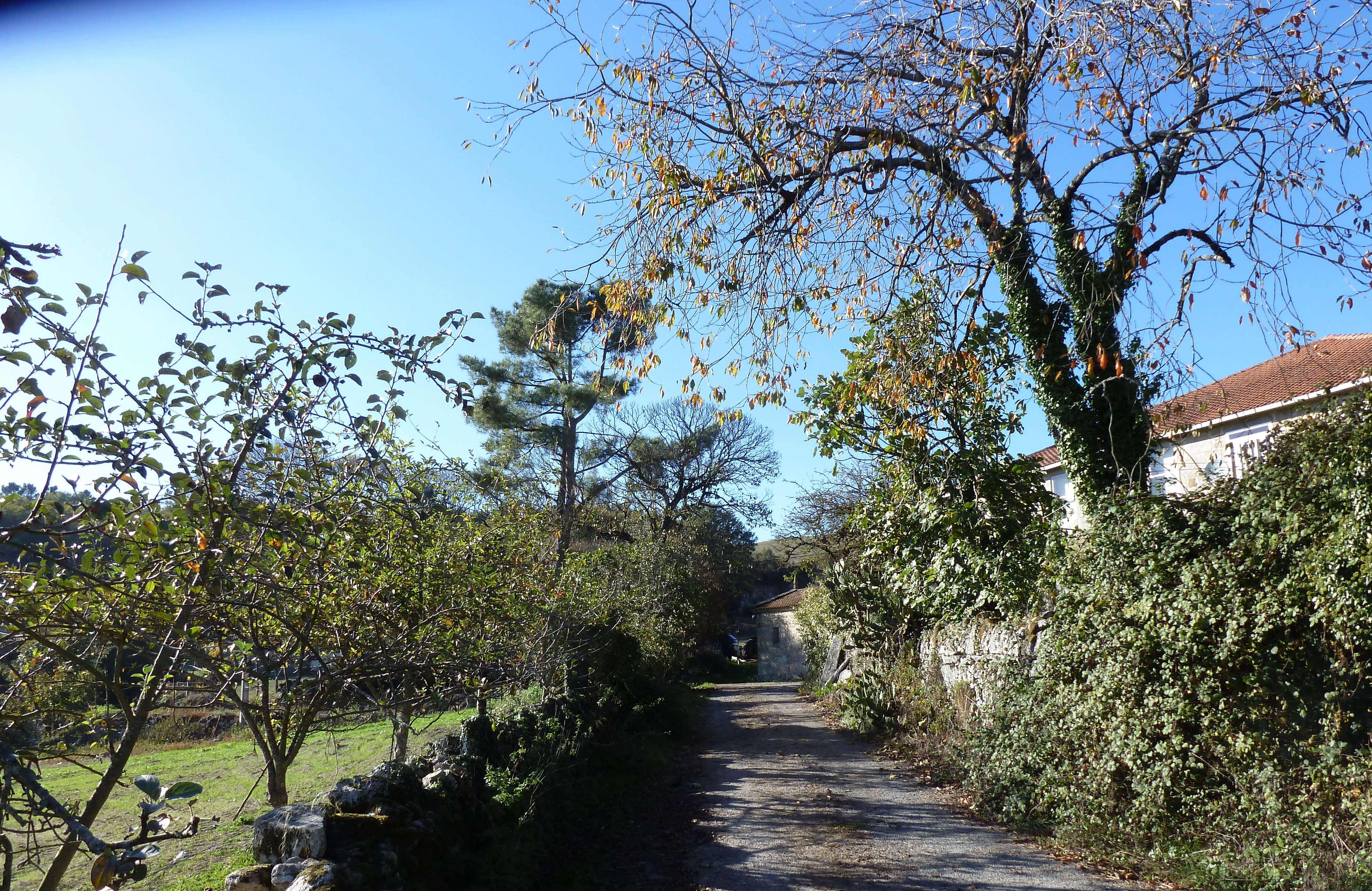 Aspai, Santa Uxía, Chantada